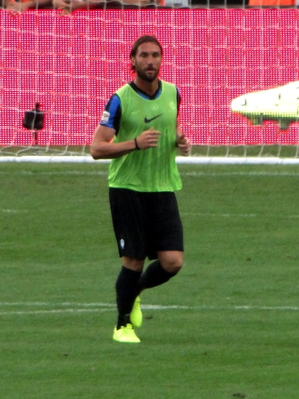 Rolando Bianchi, calciatore italiano, in allenamento all'Atalanta.